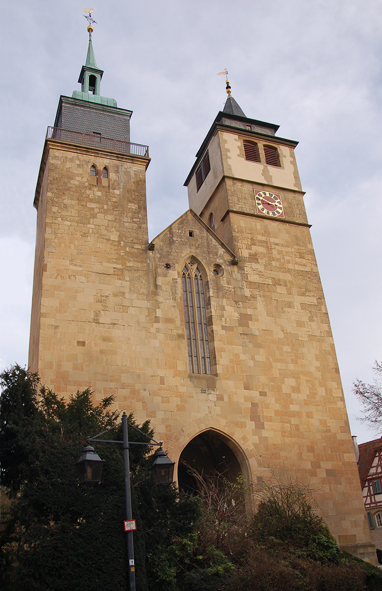 Das im 14. Jahrhundert errichtete Westwerk der Bartholomäuskirche in Markgröningen.